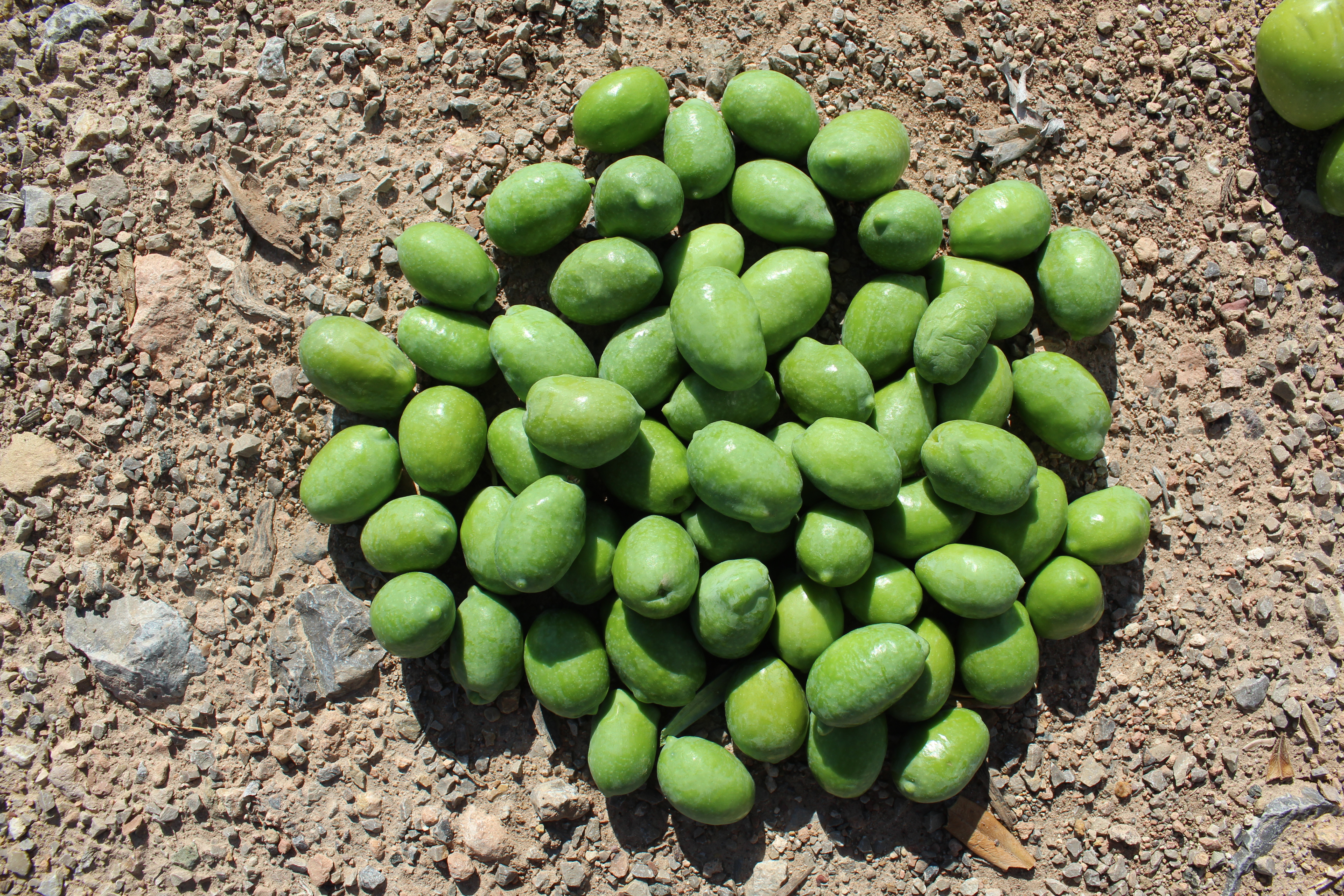 Detalle de aceitunas de la variedad Pico Limón o Limoncillo.